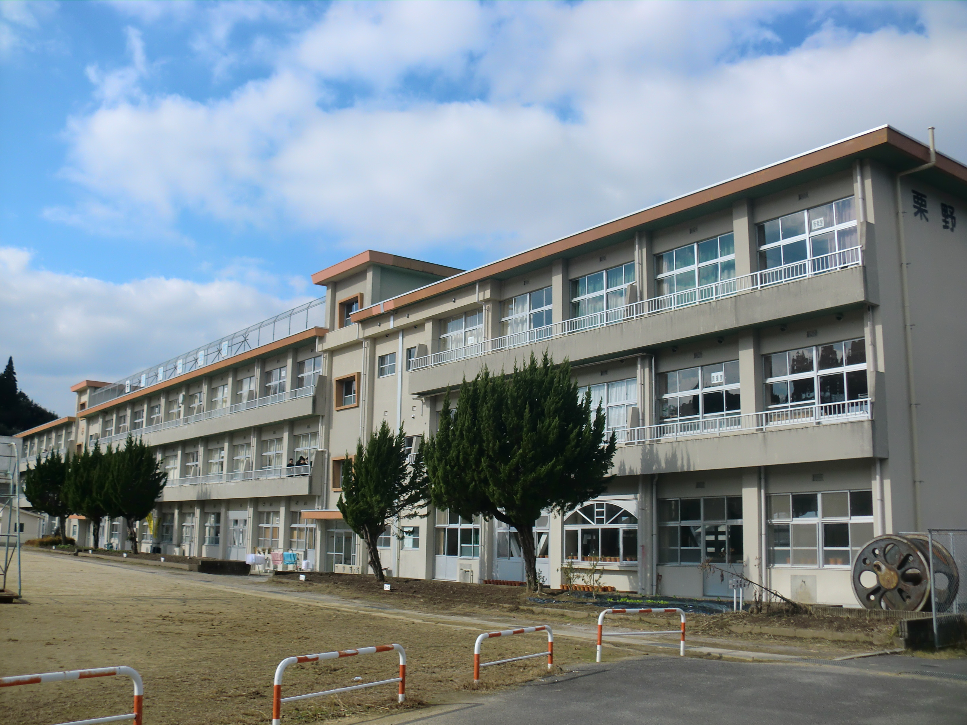 湧水町にある湧水町立栗野（くりの）中学校